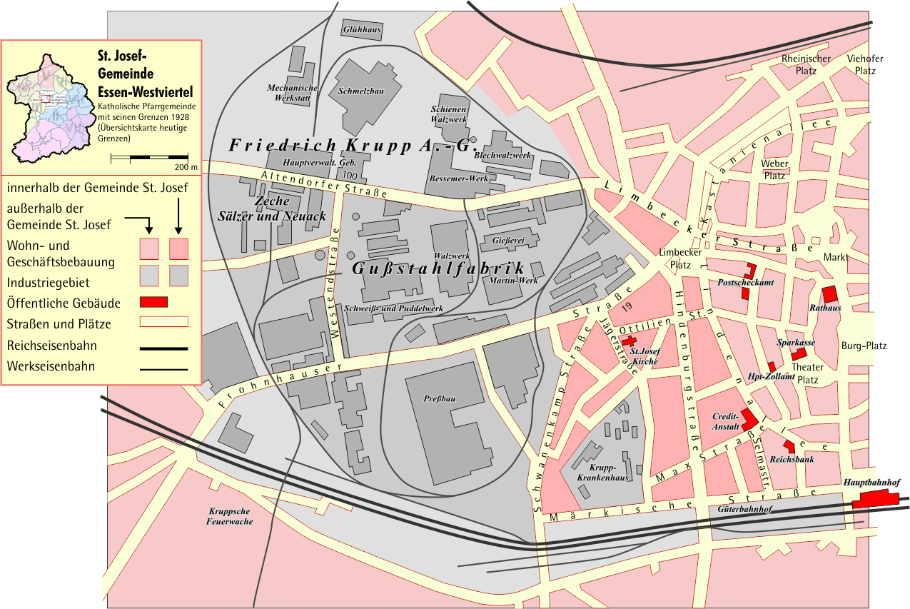 Karte des Gemeindegebietes von St. Josef, Essen, Ruhrgebiet